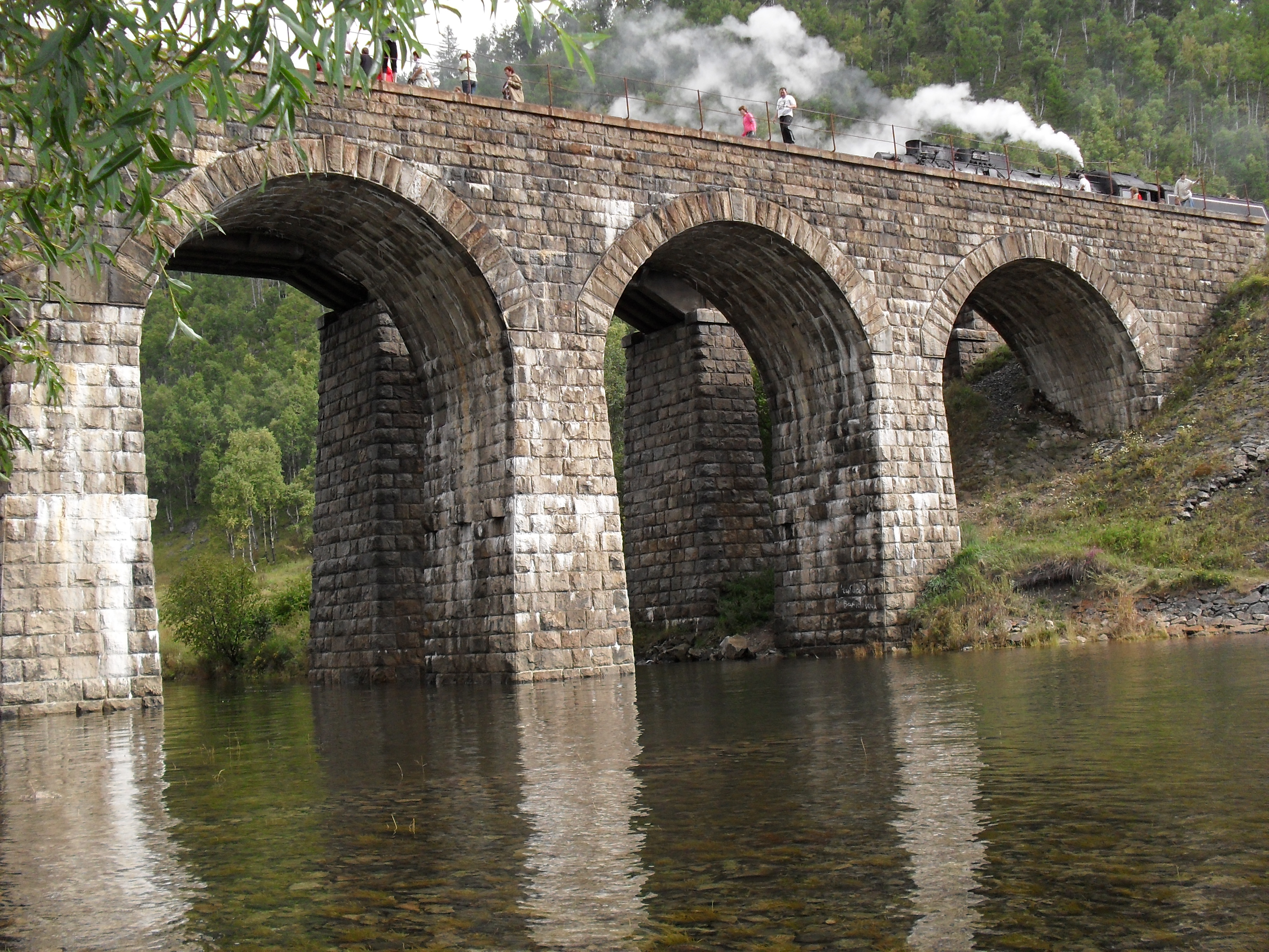 Круго-Байкальская Железная Дорога. Мост.